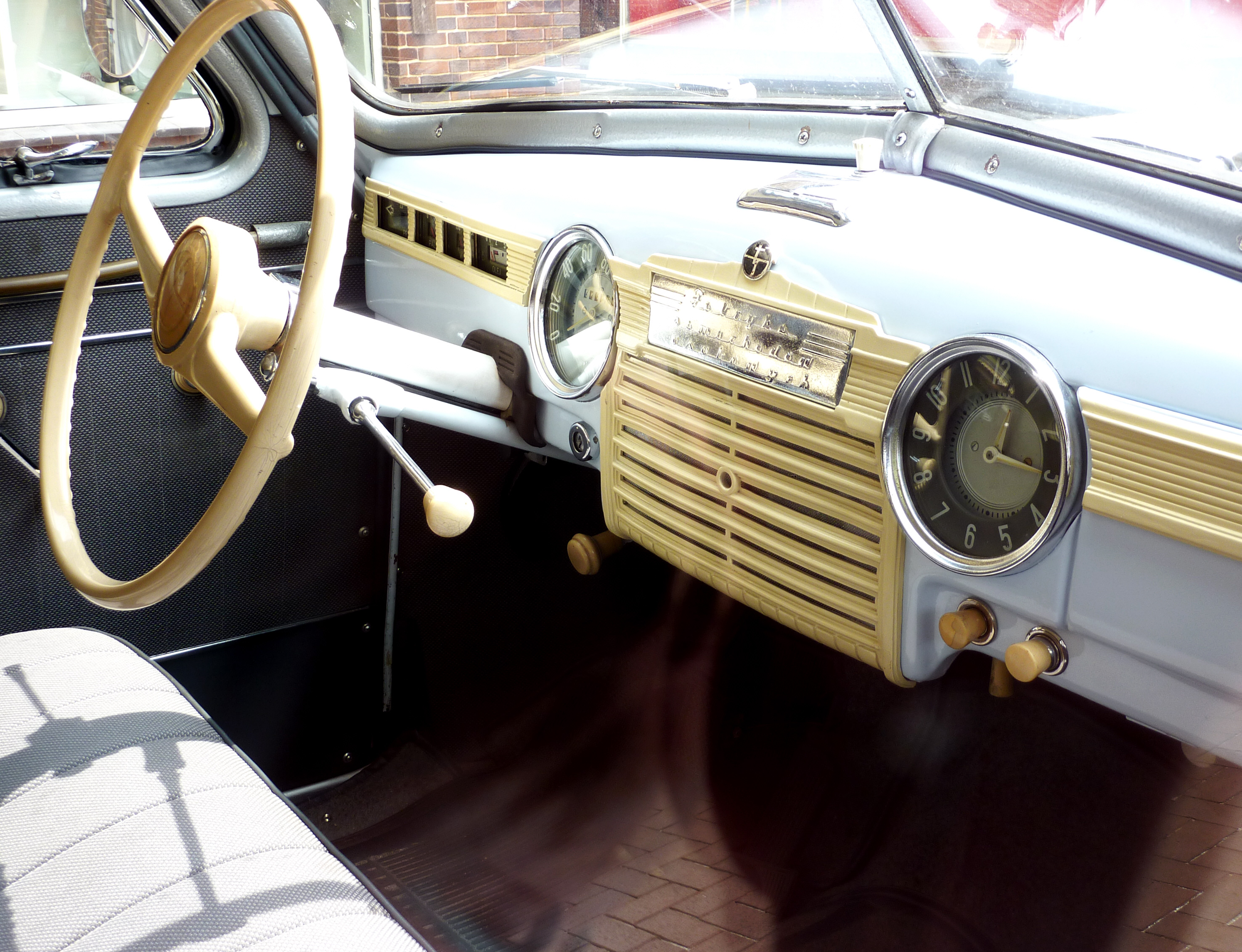 Ein Warszawa M20, gebaut in den 50er Jahren in Polen. Ansicht des Cockpits.